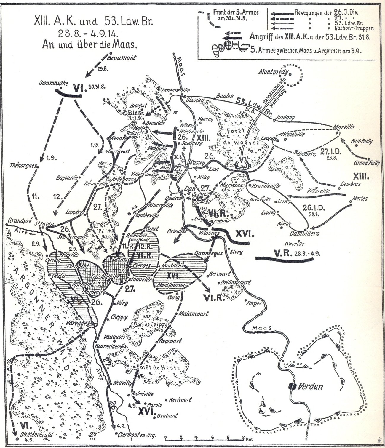 Karte Seite 22: XIII. Armee-Korps an der Maas 1914